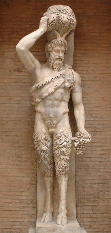 Haut-relief du dieu Pan (probablement un télamon), connu sous le nom de « satyre della Valle », découverte près du théâtre de Pompée, sur le Champ de Mars, probablement de la fin de l'époque hellénistique. H. 2,79 m.